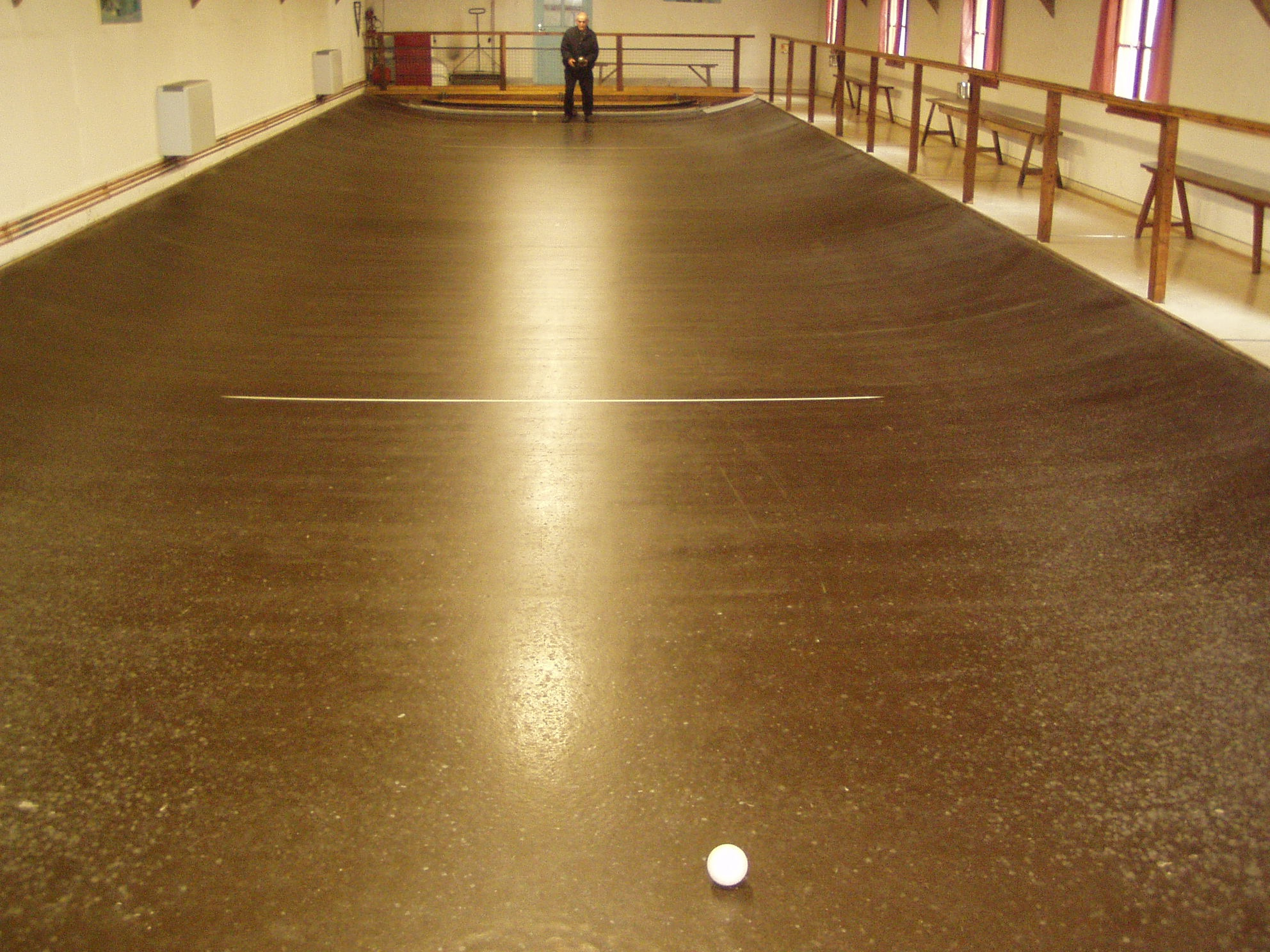 Terrain de jeu de Boule de fort Photo personnelle de Julien Thurion (User:Belgavox)prise le 26 mai 2006